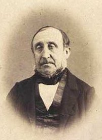 Thomas Hansen Erslew (10.11.1803-17.3.1870), dansk litteratur- og personalhistoriker